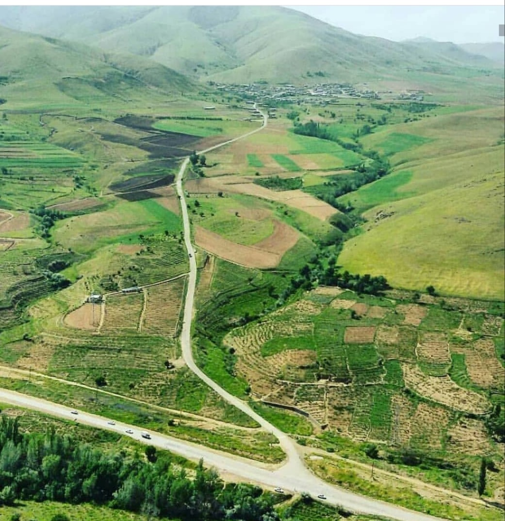 کینه ورس